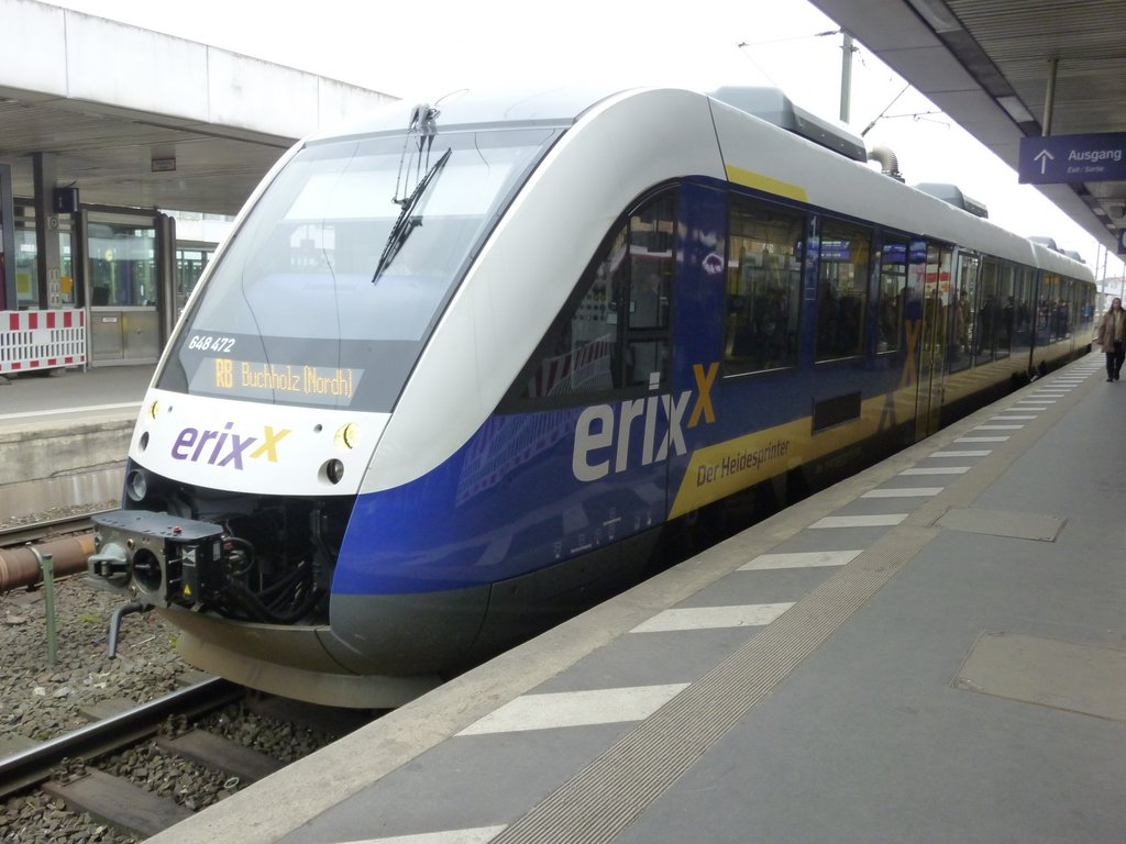 Erixx Triebwagen 648 472 in Hannover Hbf.